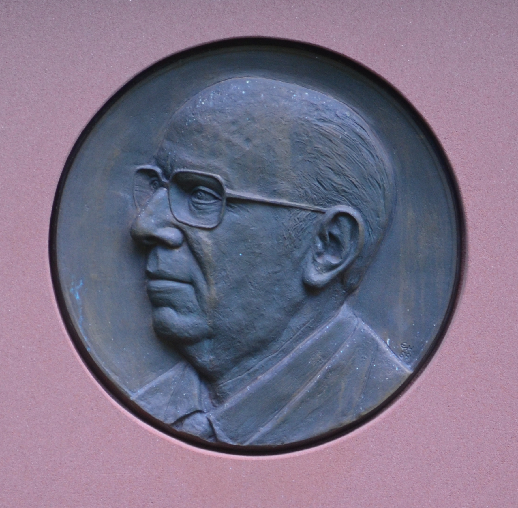 Frankfurt, Hauptfriedhof, Grab Albert Richard Mohr, Portrait